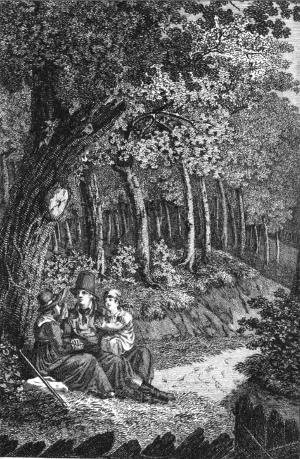 Frontispiz des Druckes von 1824